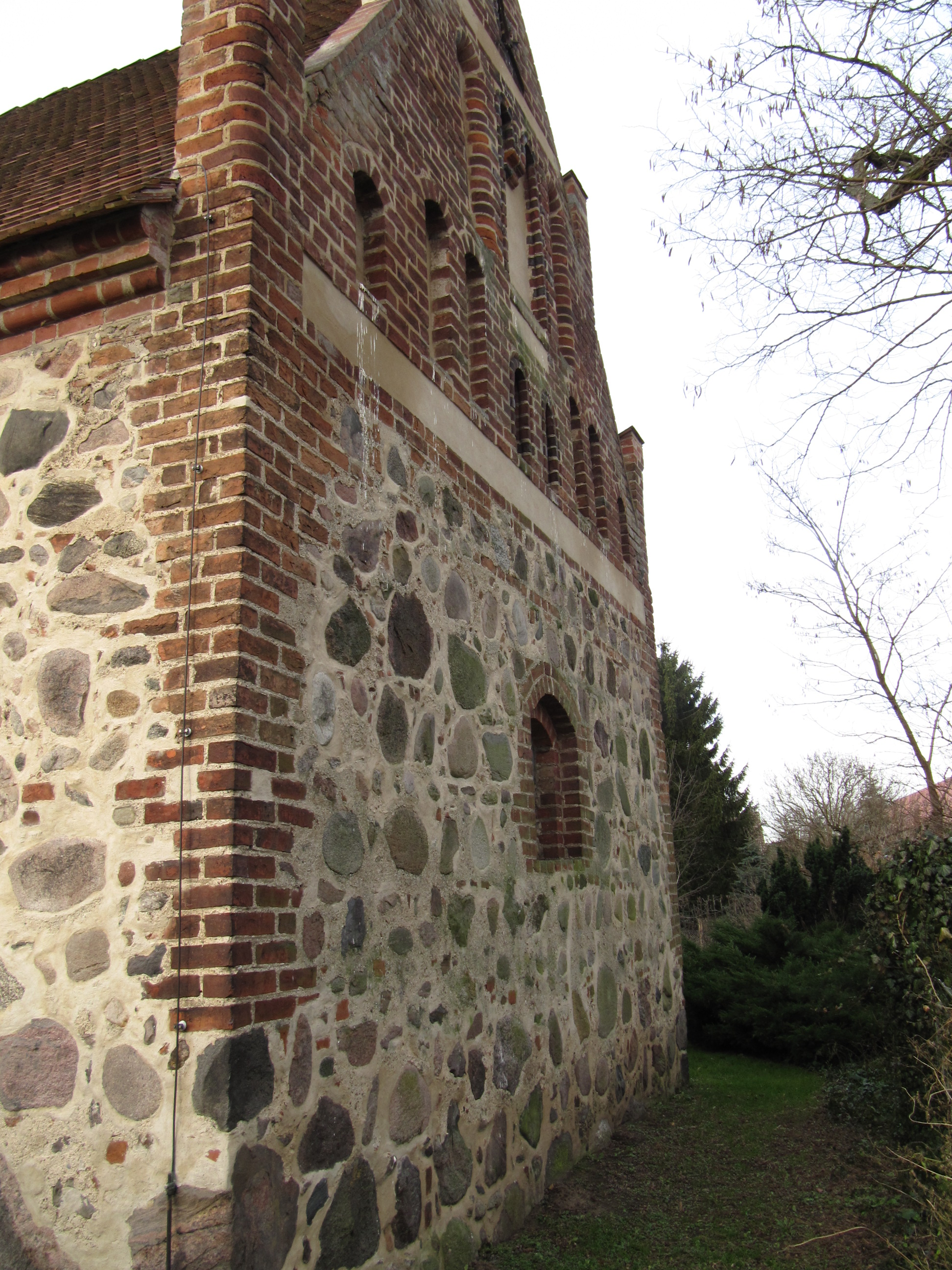 kirche gortz ostwand